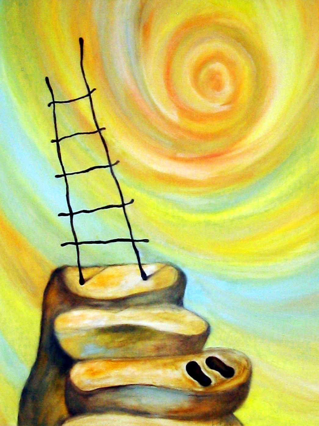 Cuadro al oleo de estilo surrealista del pintor mallorquín Tomás Ortega Díaz llamado Serenidad.